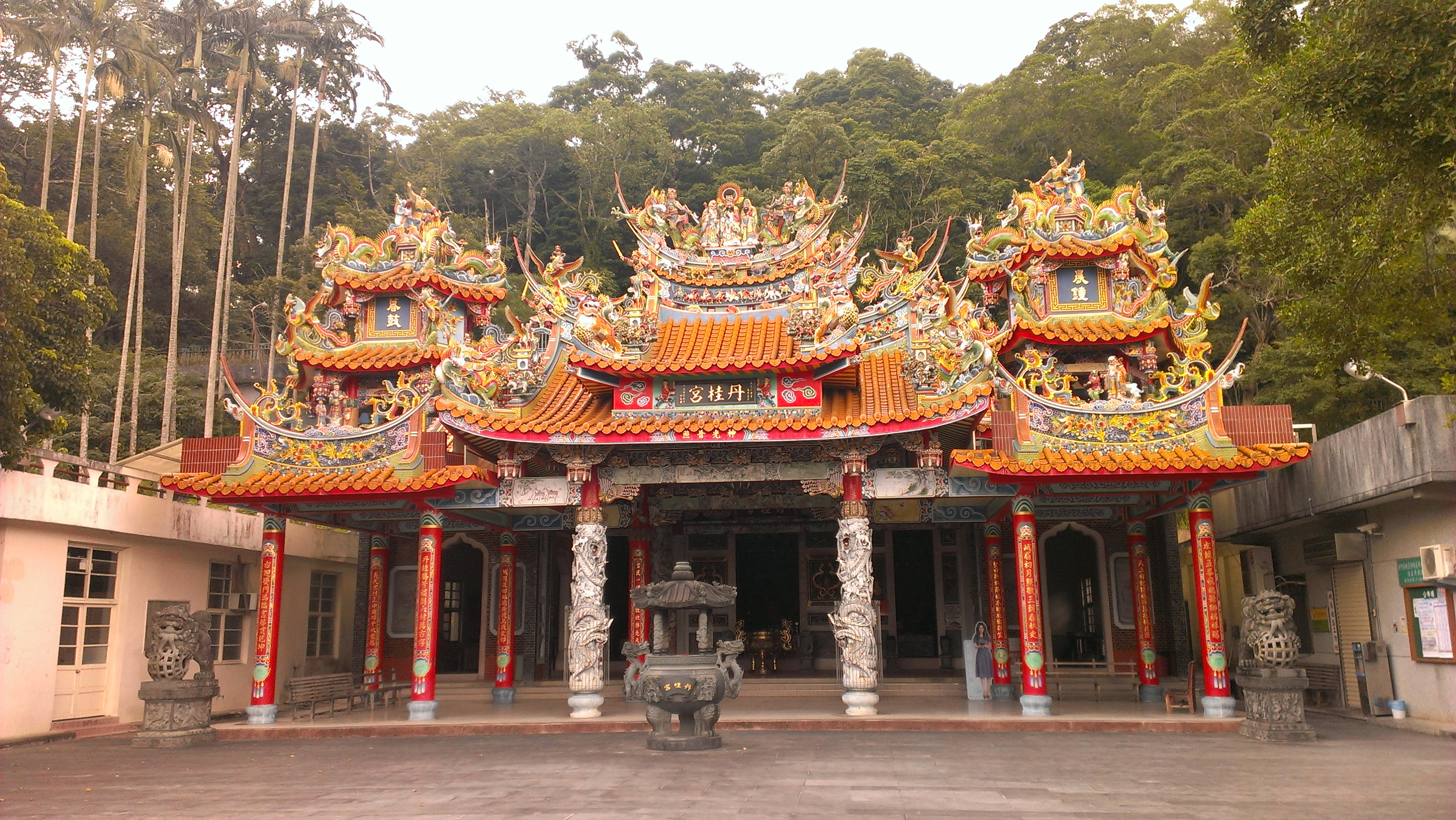 中文（台灣）: 臺灣新竹縣峨眉鄉峨眉鄉丹桂宮